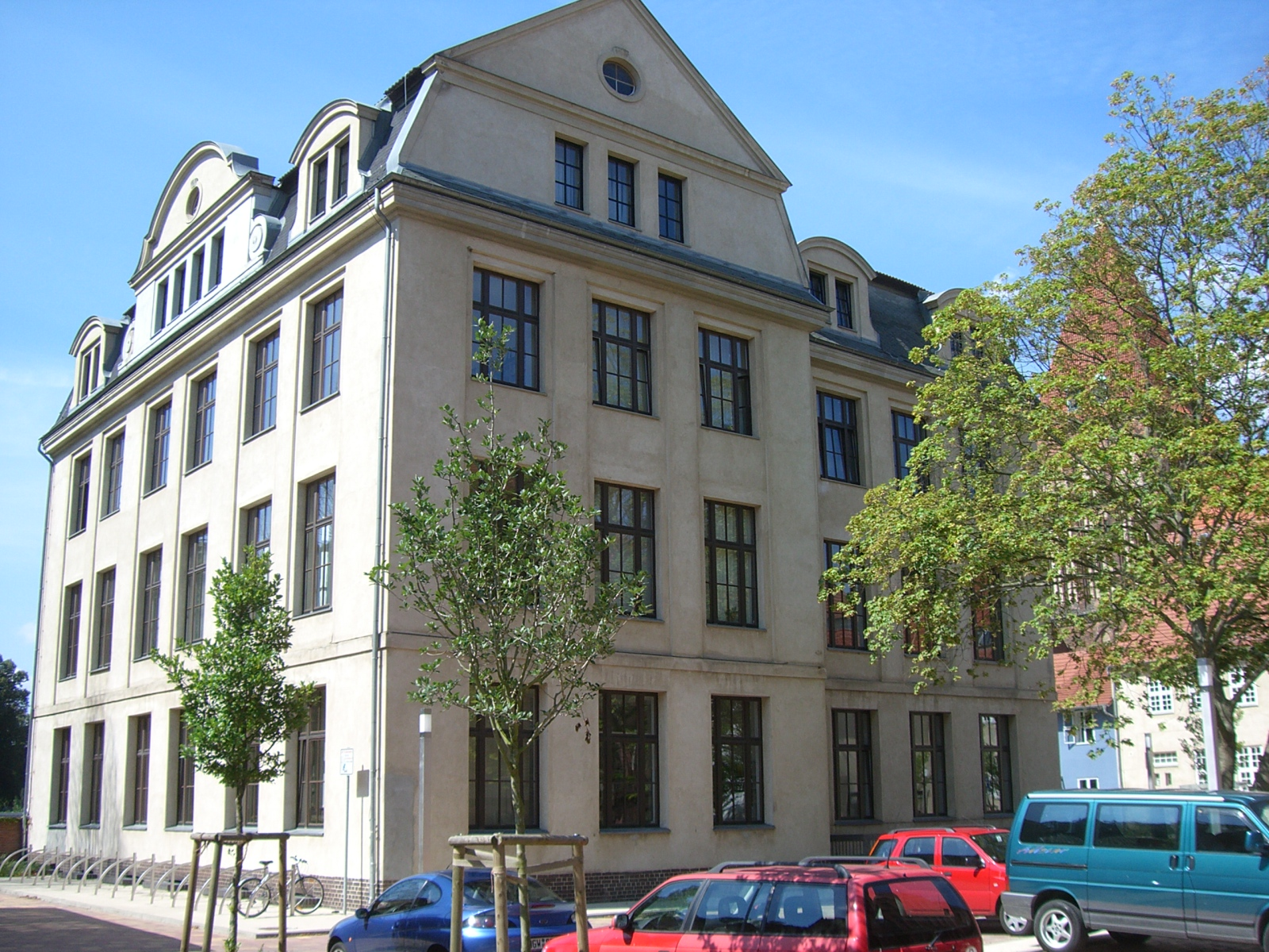 Historisches Institut der Ernst-Moritz-Arndt-Universität Greifswald